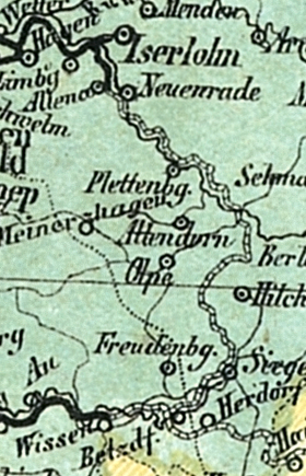 Ausschnitt Hagen-Siegen aus der Bahnkarte_Deutschland_1861